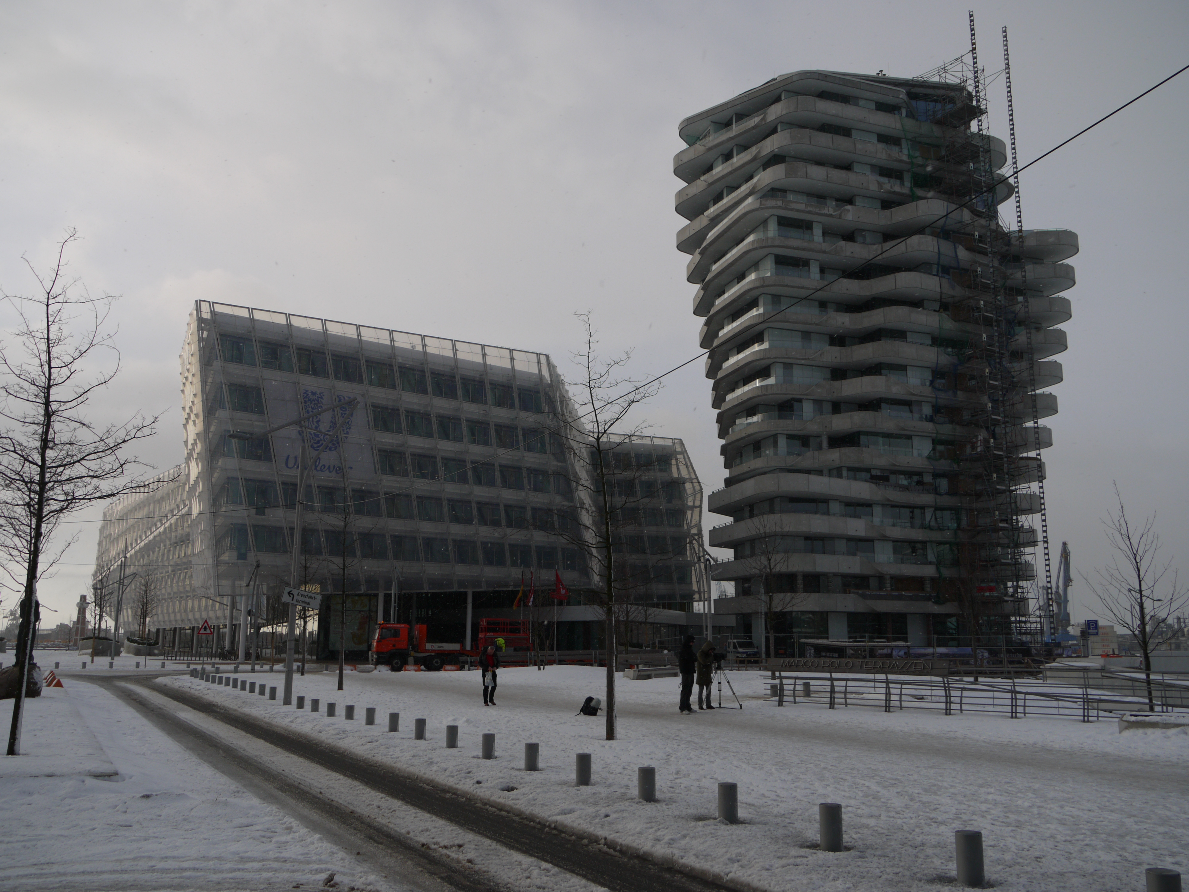 Das Gebäude der Unilever-Gruppe und der Marco-Polo-Tower auf dem Strandkai in der HafenCity.